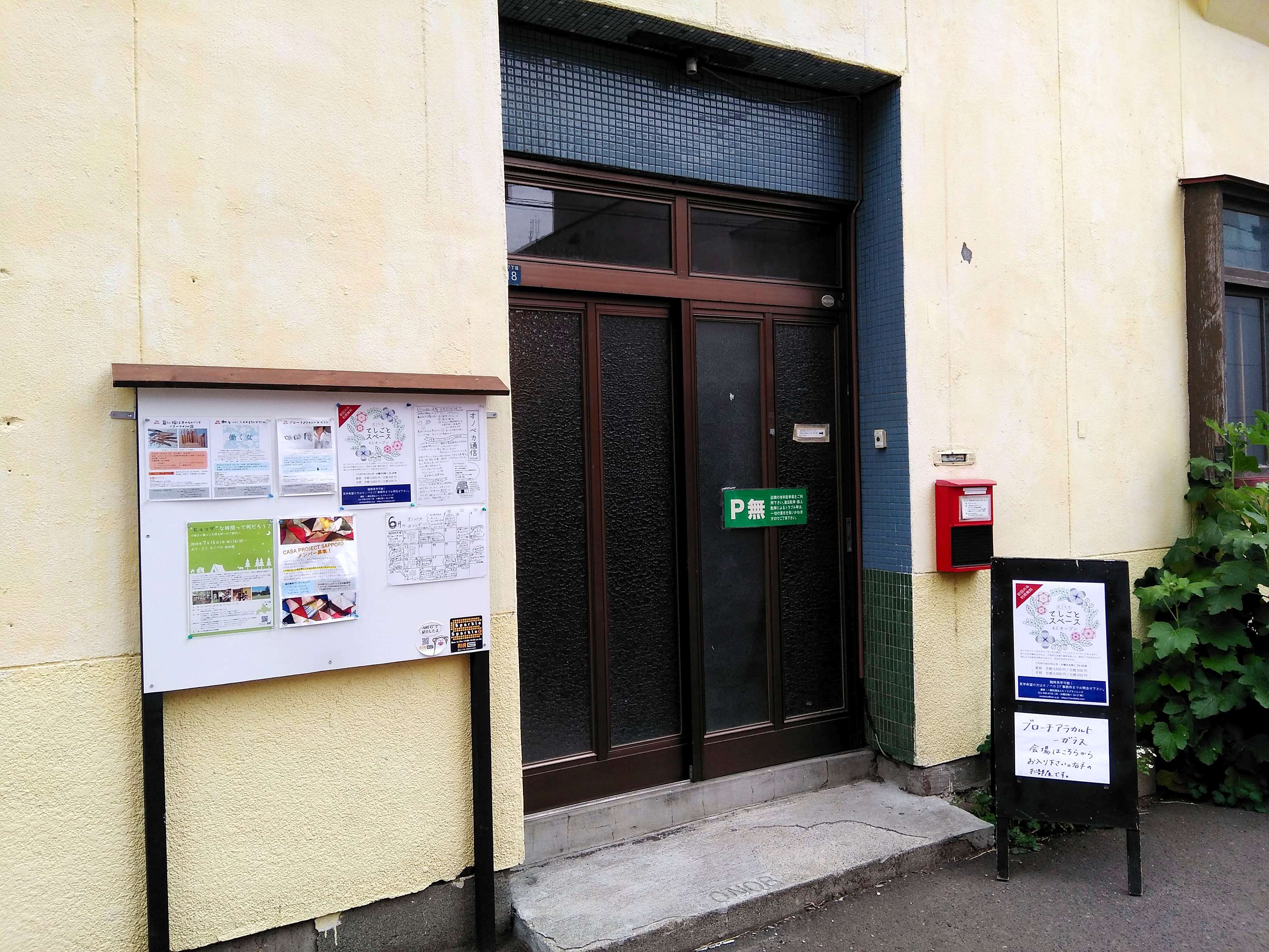 オノベカ西側出入り口。